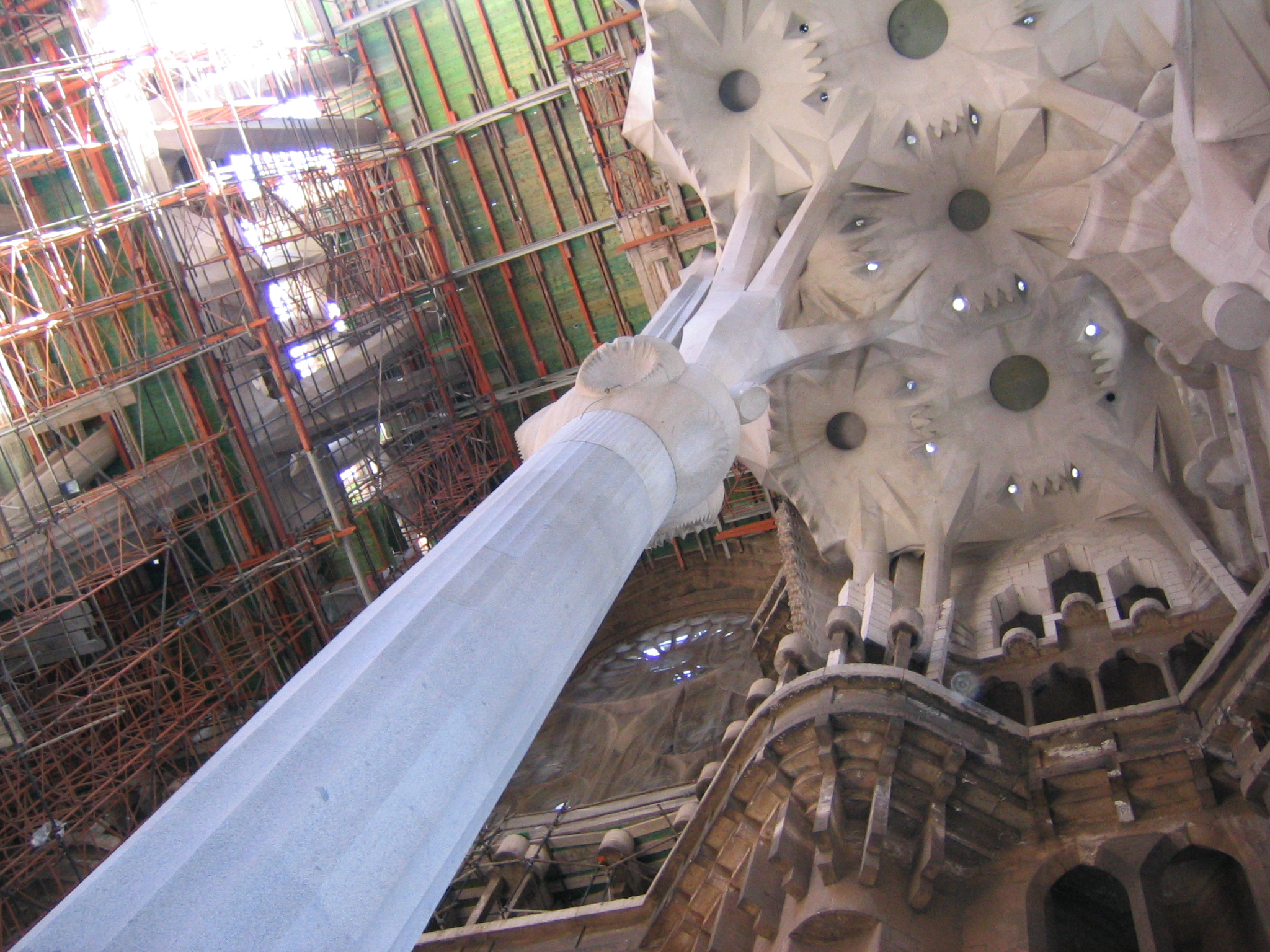 Sagrada Familia, Barcelona, 2004